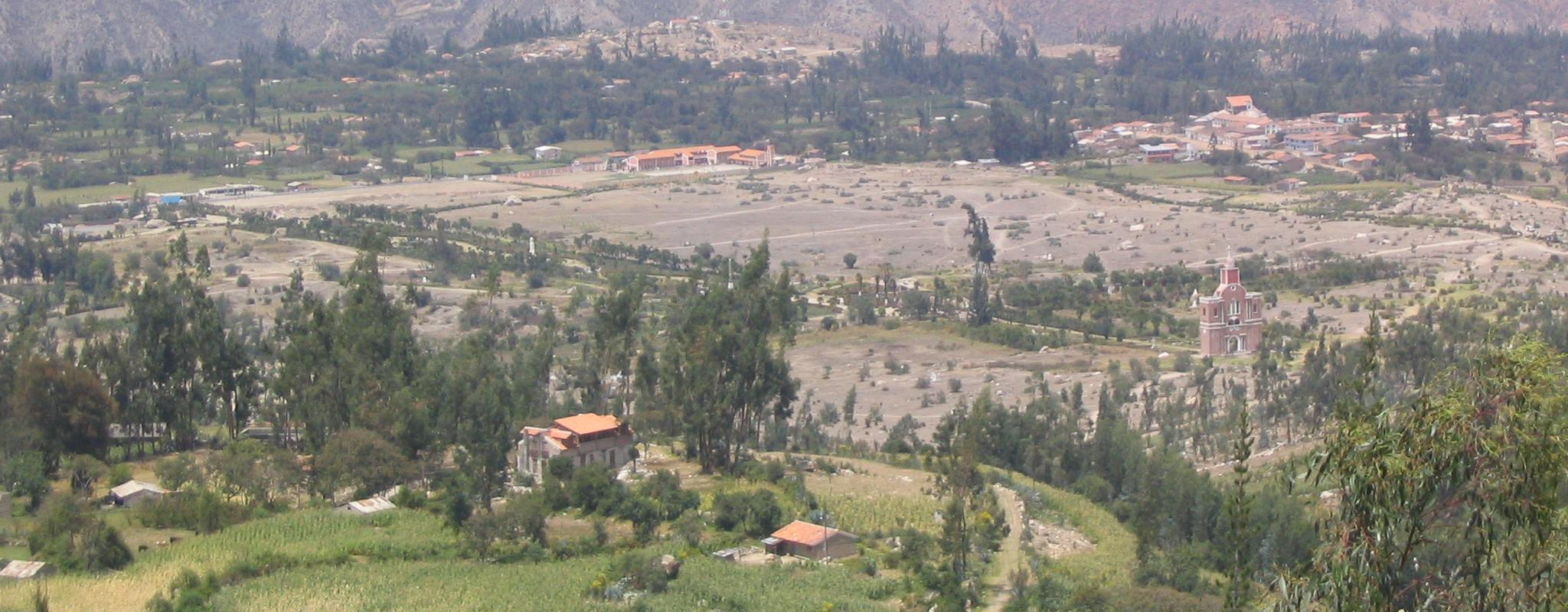 Yungay Viejo in Peru, Ancash